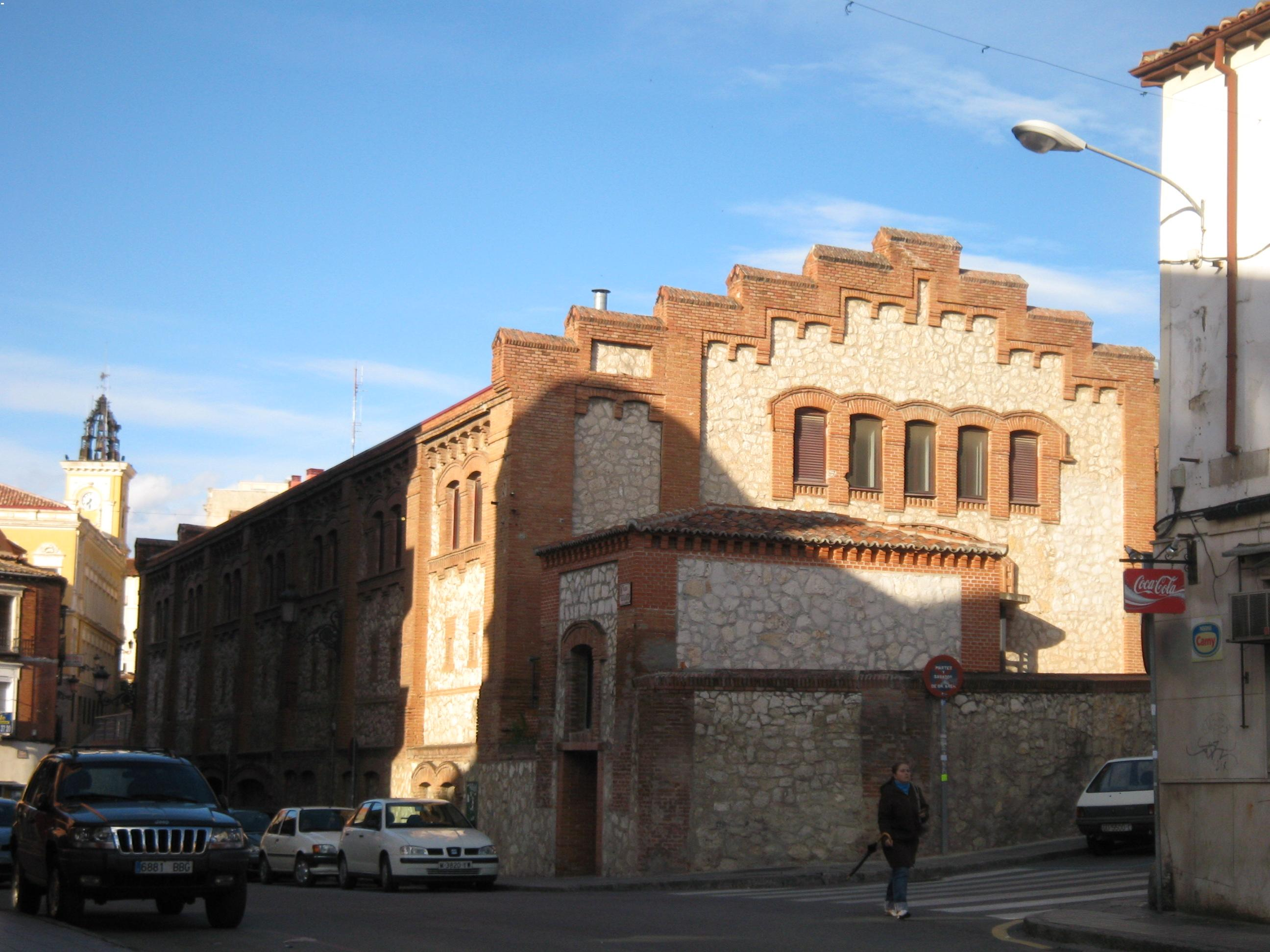 Market in Guadalajara, Spain